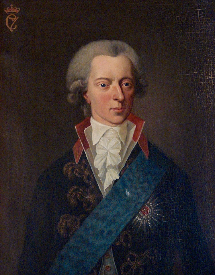 Kong Christian VII af Danmark og Norge (1749-1808), Egeskov Slot, Fyn, Danmark